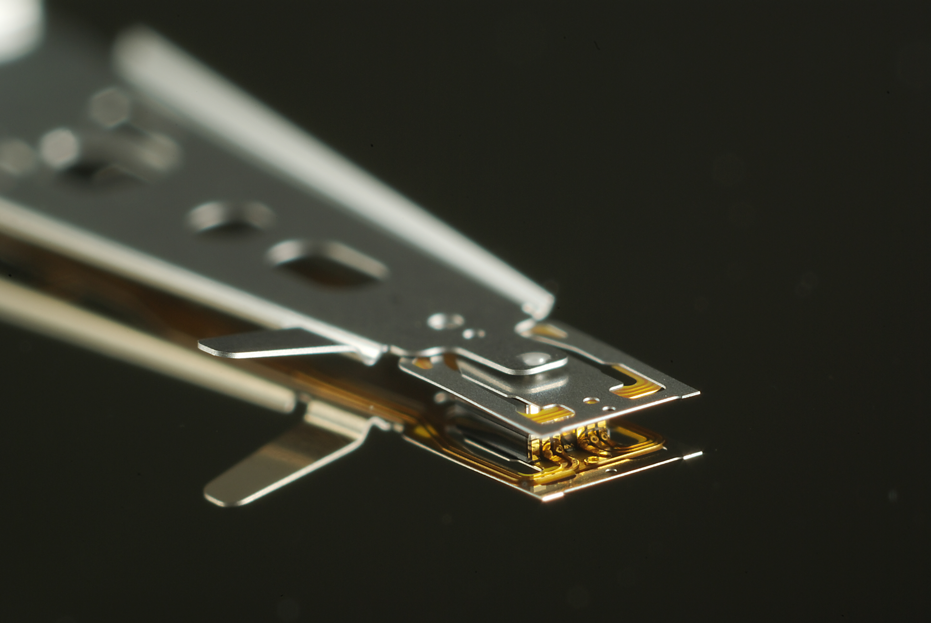 Der Schreib/Lesekopf einer 2.5"-Festplatte (Toshiba MK2110MAT) spiegelt sich auf der Oberfläche der magnetisch beschichteten Aluminiumscheibe. Nahaufnahme mit Minolta MC 2.8/24mm bei Blende 11